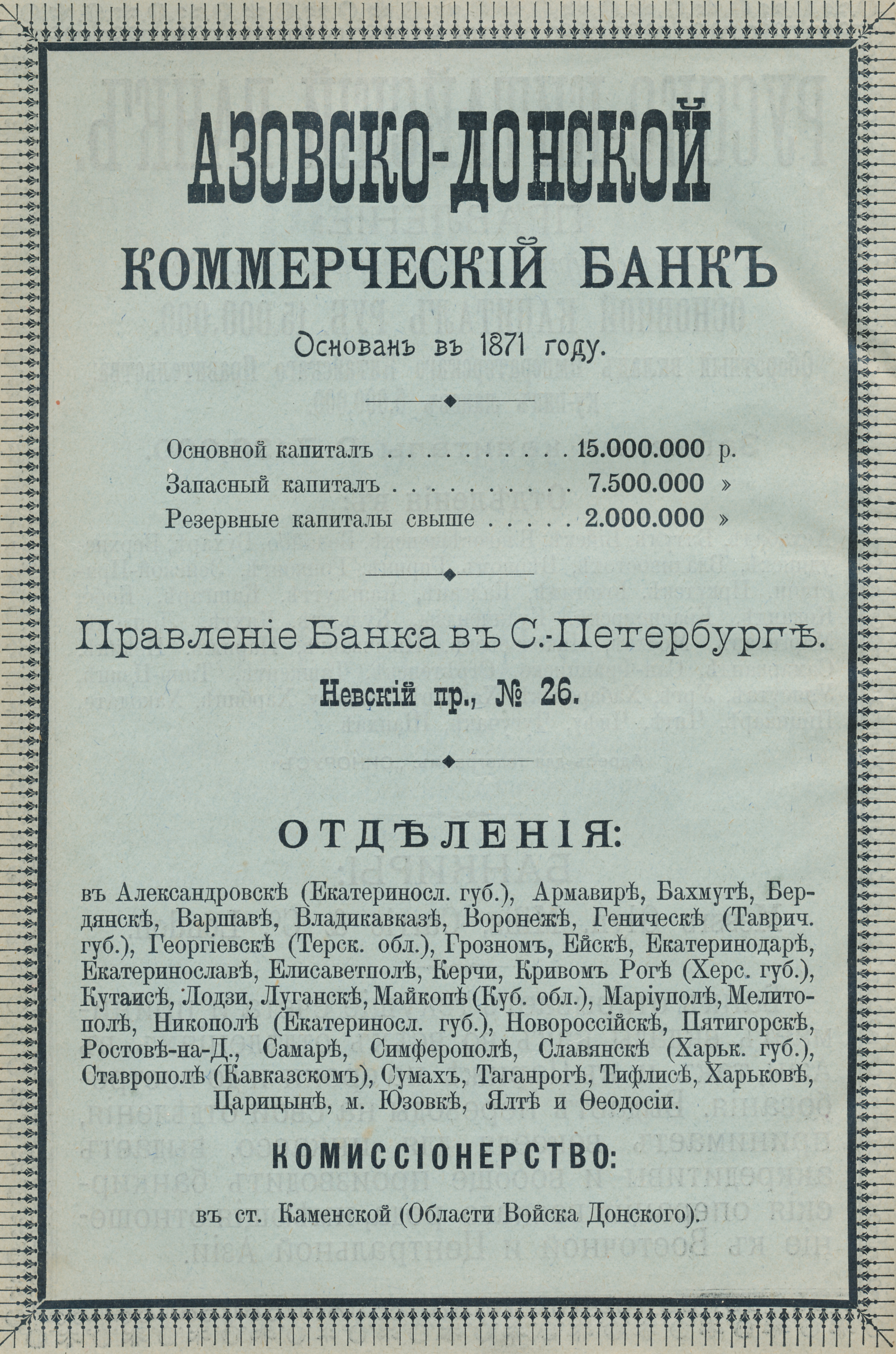 Реклама Азовско-Донского коммерческого банка, 1907 год.